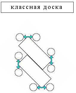 При такой посадке требуется в два раза меньше столов, чем при посадке "рядами по двое за столом". Высвобождается много места для свободного прохода от одной группы к другой.